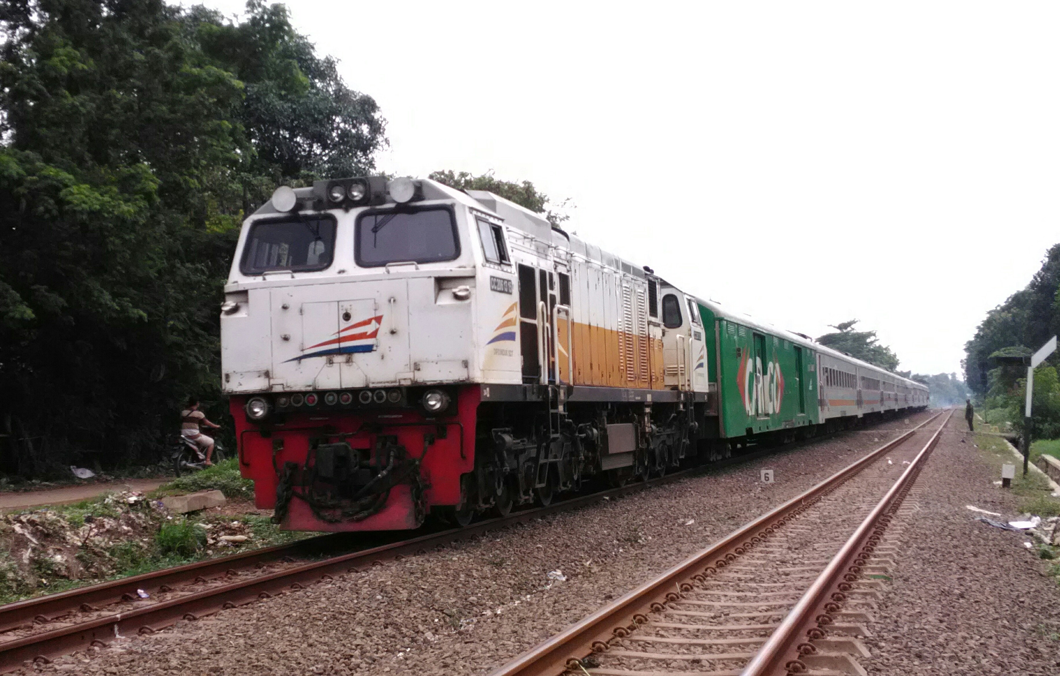 Sunda: KA Malabar nuju wates DAOP 2 jeung DAOP 1 di daérah Sukaséuri, Cikampék